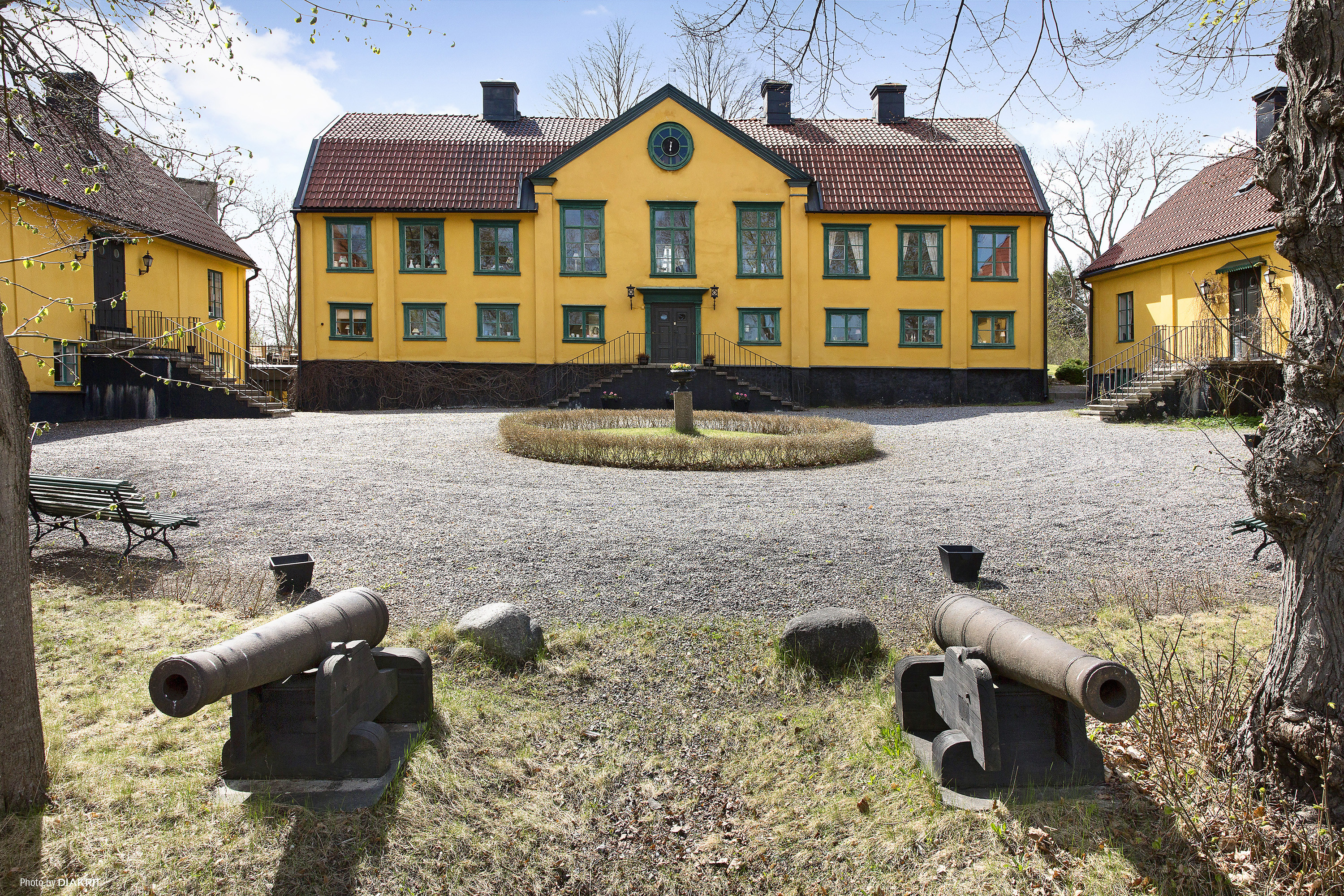 Hägerstens gård, byggd 1754.